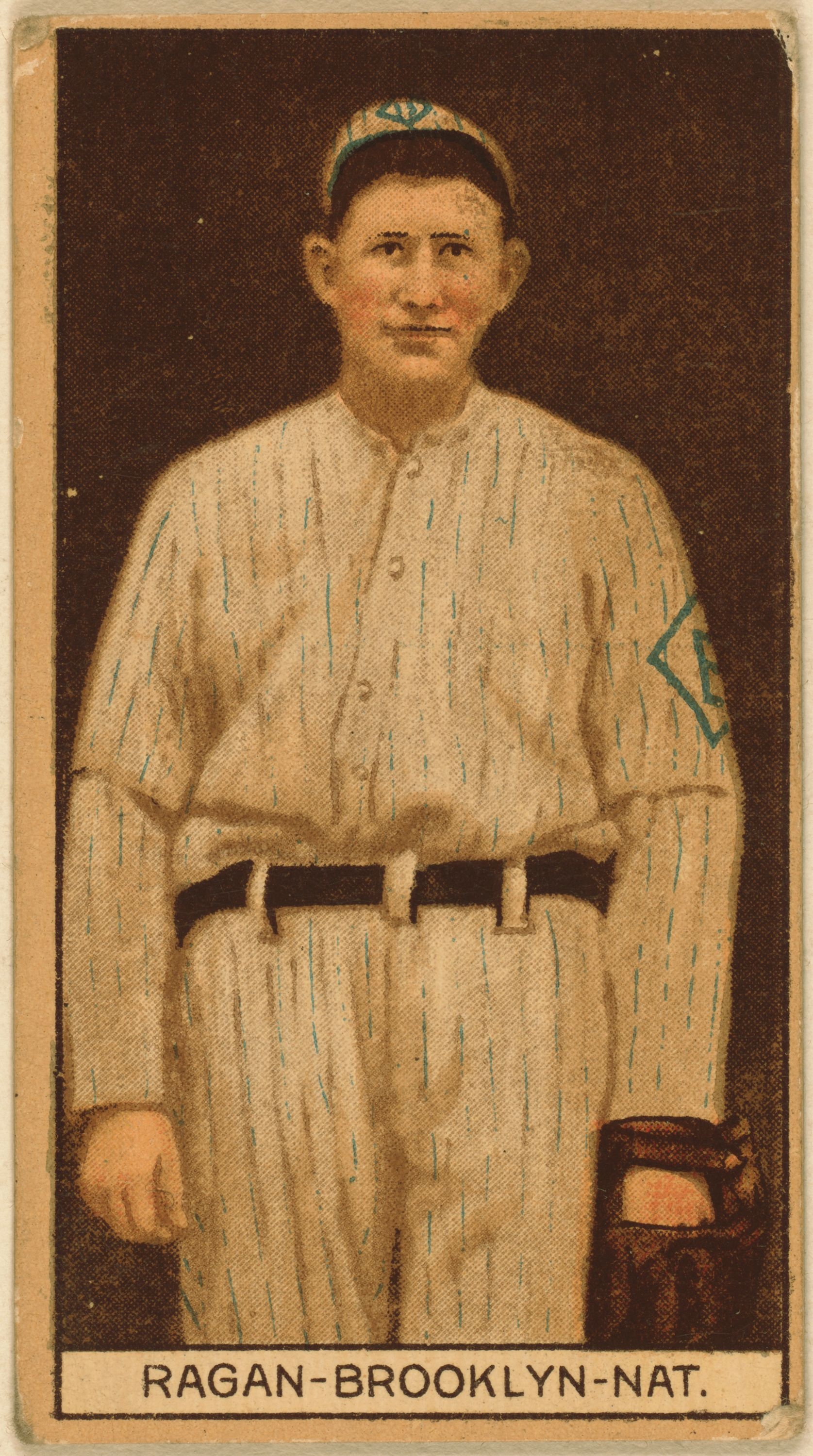 Don Carlos Ragan